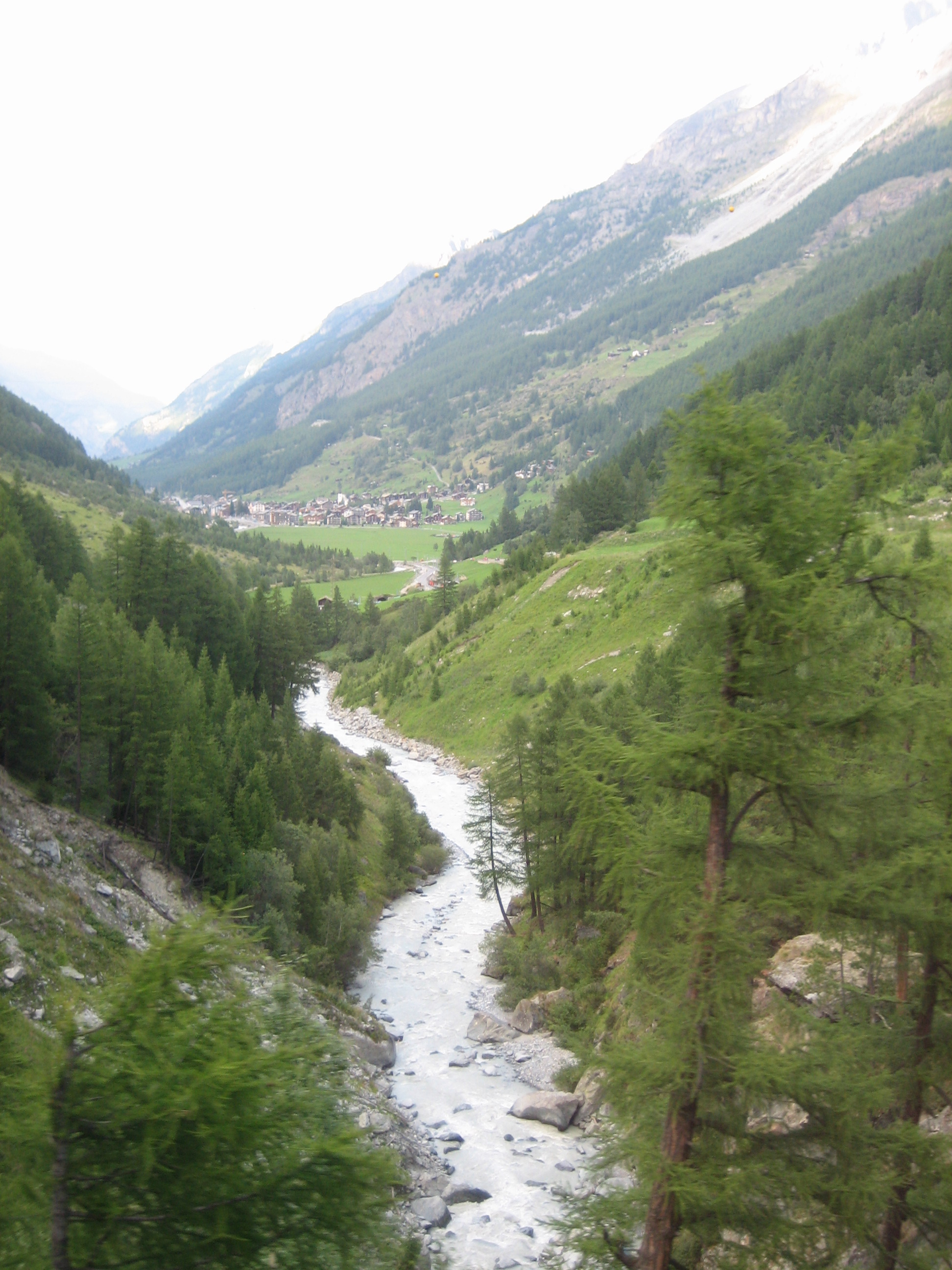 Vue sur la Vallée de Zermatt et Täsch